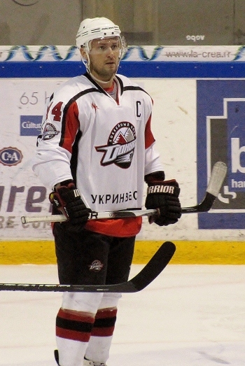 Serhiï Varlamov lors de la Coupe Continentale de hockey 2012 à Rouen